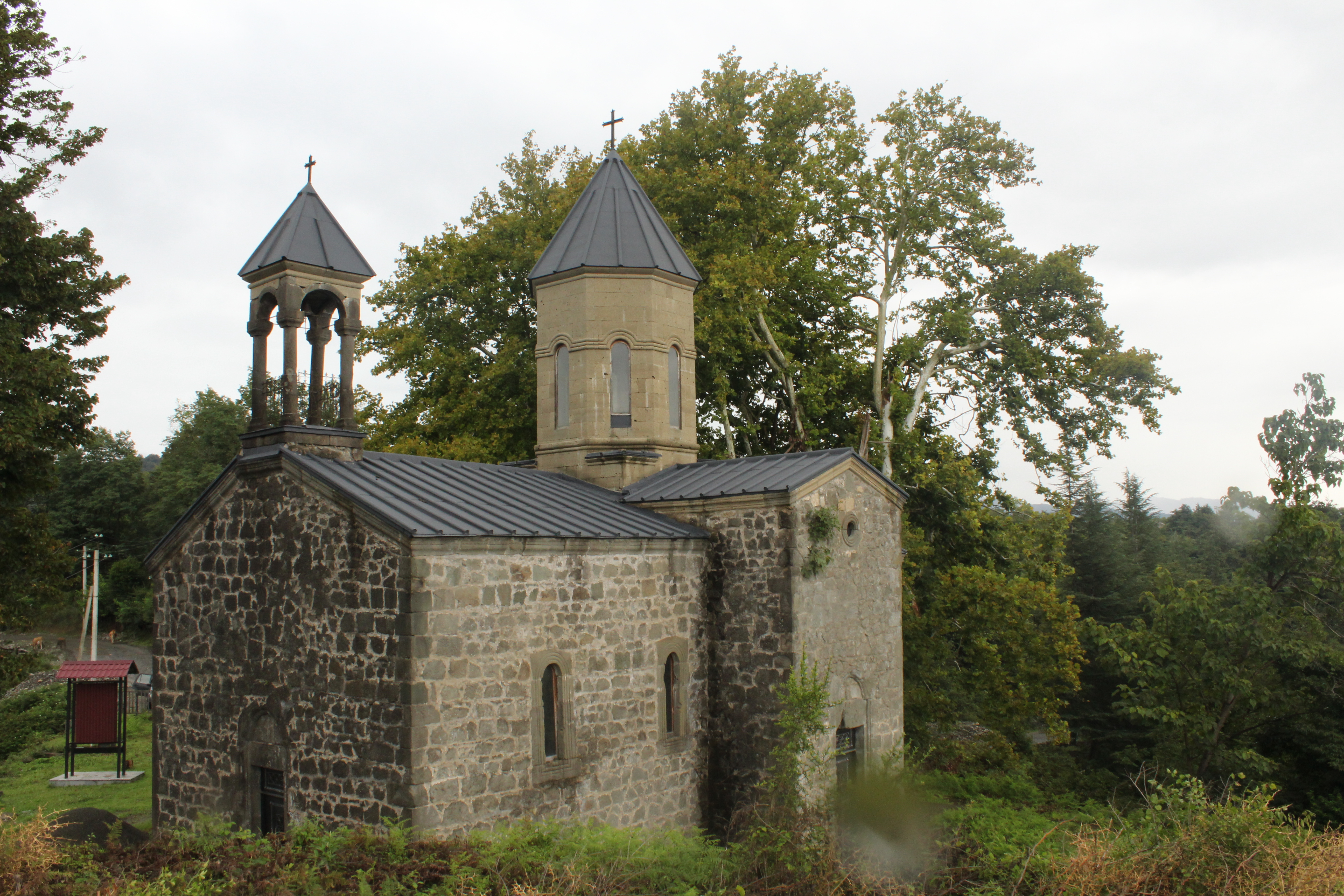 აკეთის მაცხოვრის სახელობის ეკლესია